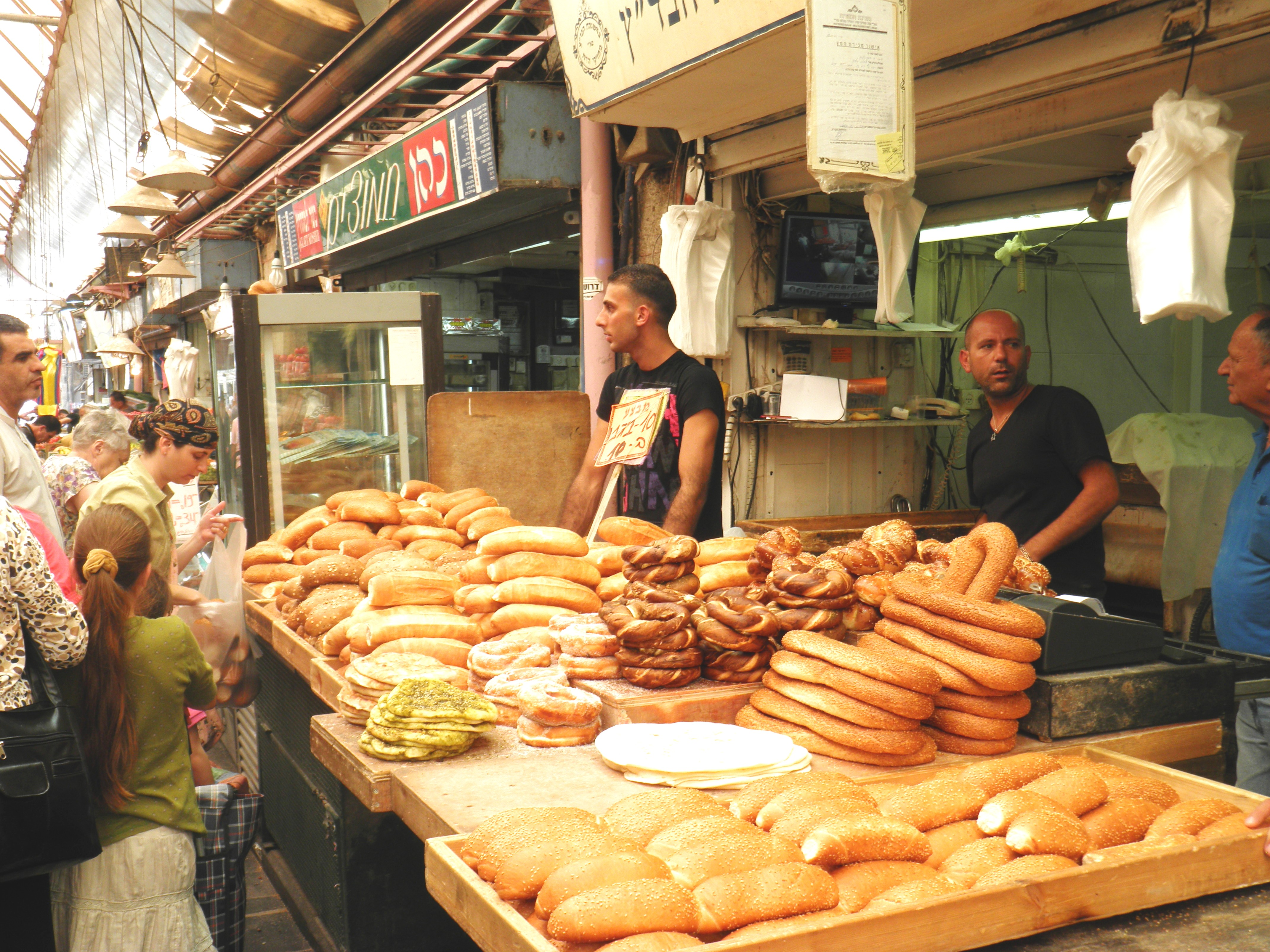 שוק מחנה יהודה